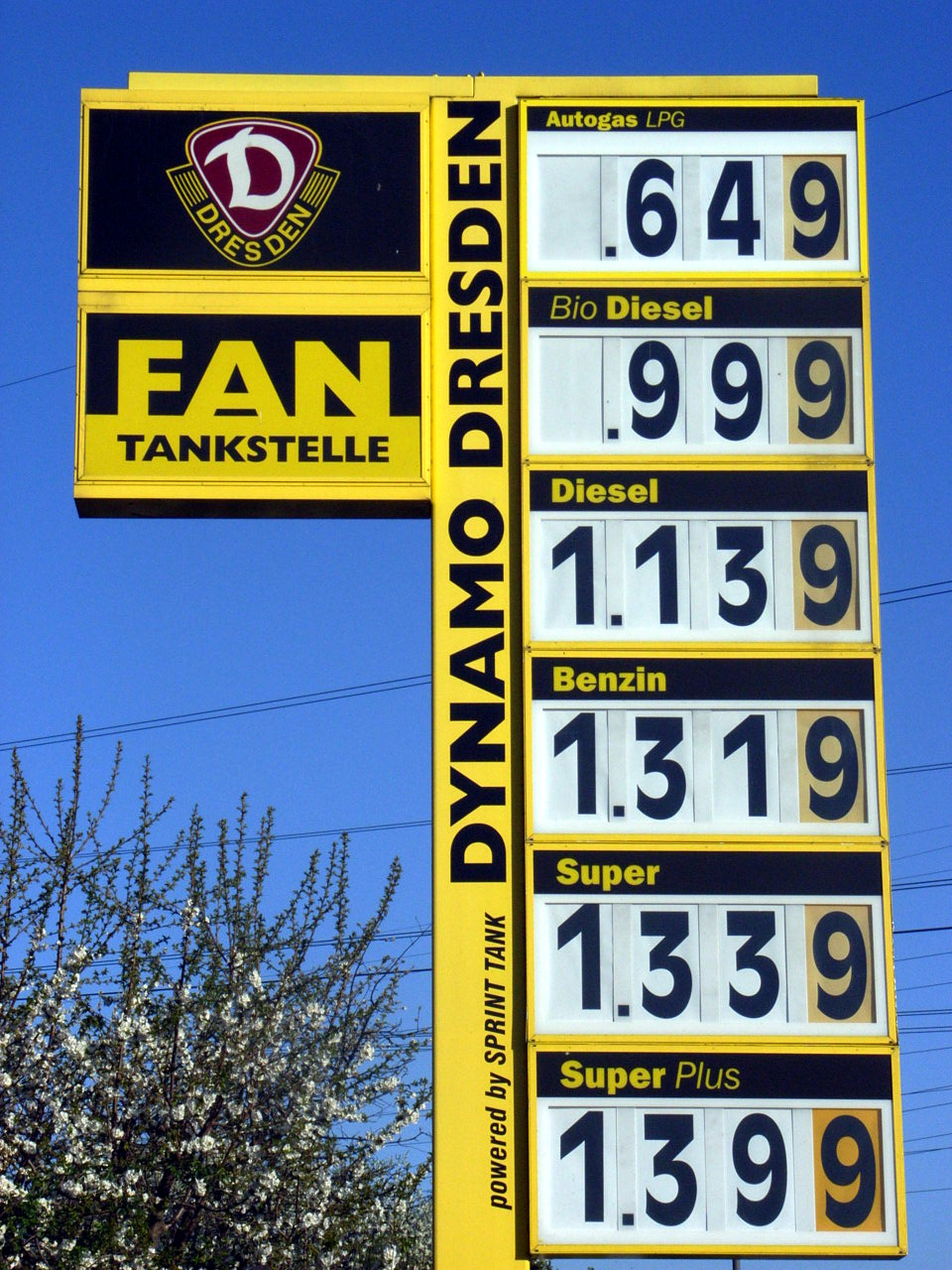 Fan-Tankstelle von Dynamo Dresden